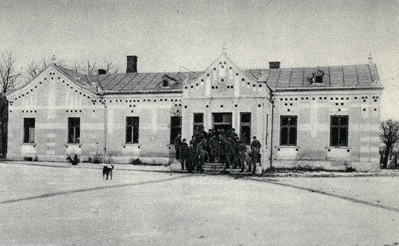 Komenda Polskiego Korpusu Posiłkowego w Łużanach na Bukowinie.